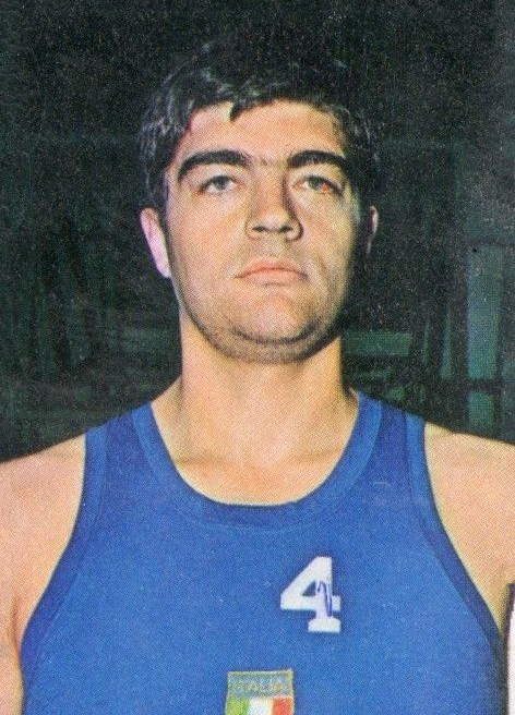 EDIS CALCIATORI 1975/76-Figurina n.341- DELLA FIORI - BASKET -Rec